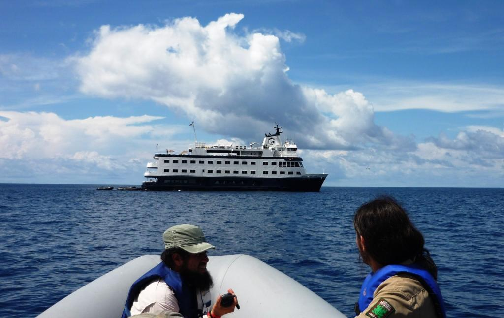 Los guarda parques despliegan una intensa labor de control de los visitantes a la zona de protección.